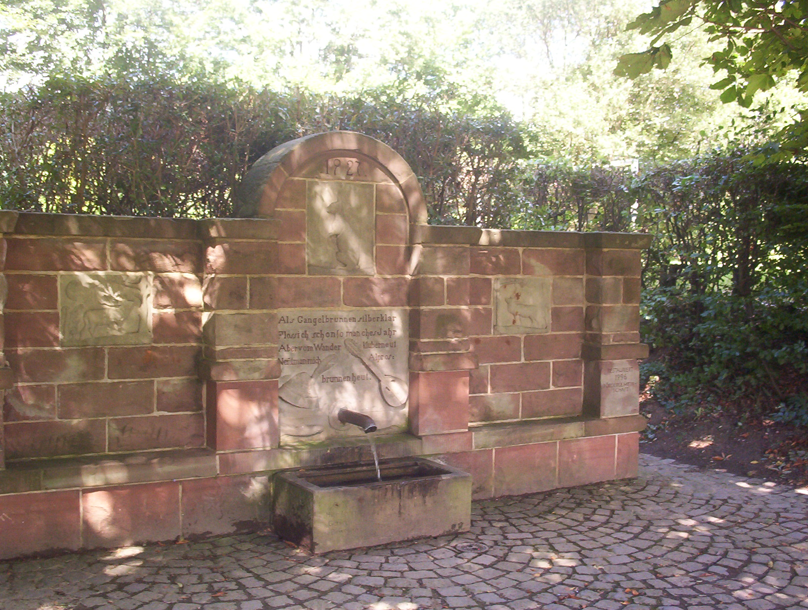 Bild des 1927 errichteten Gangelbrunnen, ein Kleinod heimischer Handwerkskunst am „Naherholungsgebiet Ommersheimer Weiher“